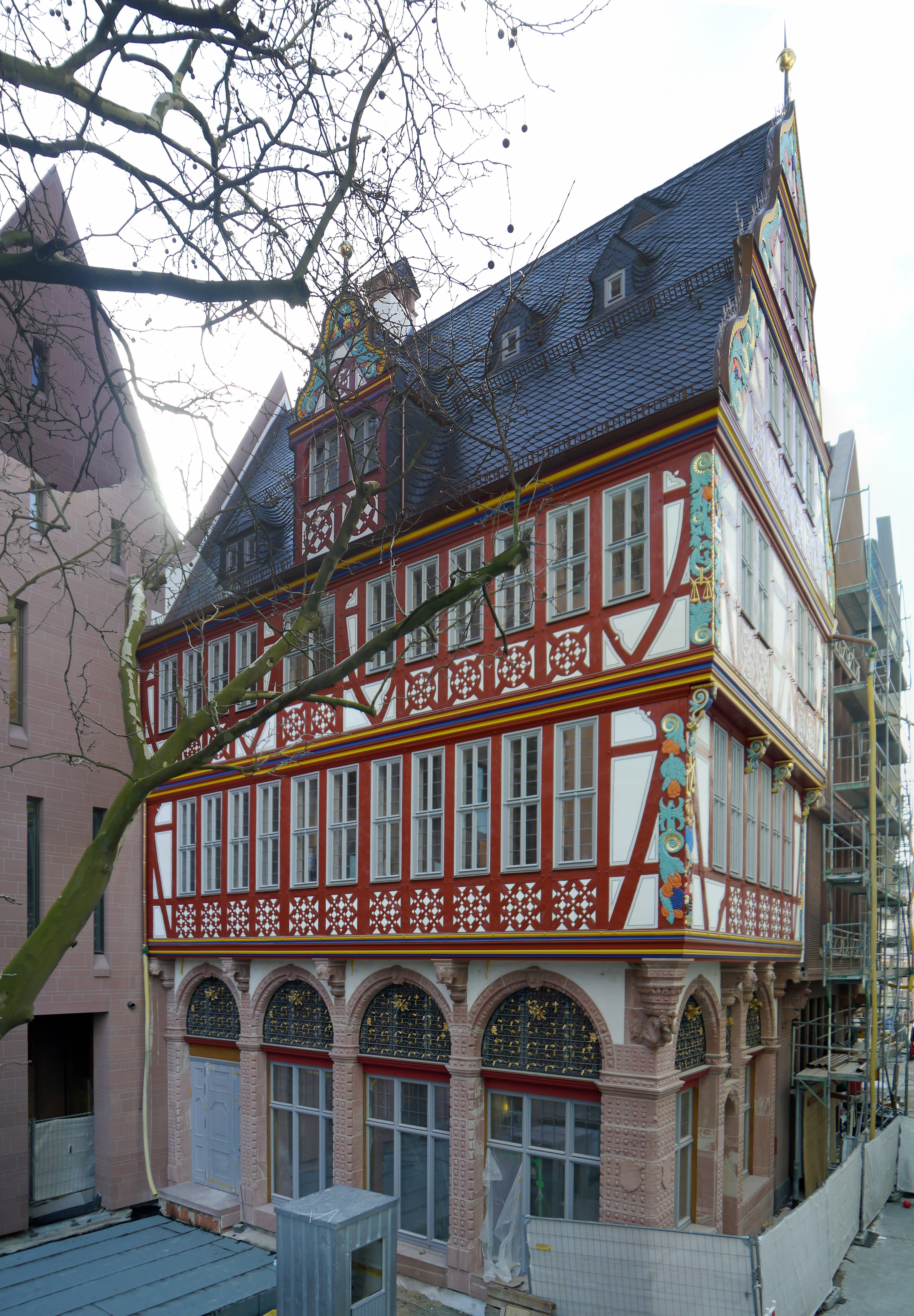 Haus zur Goldenen Waage, Ecke Domplatz- Markt 5, in Frankfurt am Main-Altstadt, Dom-Römer-Projekt.